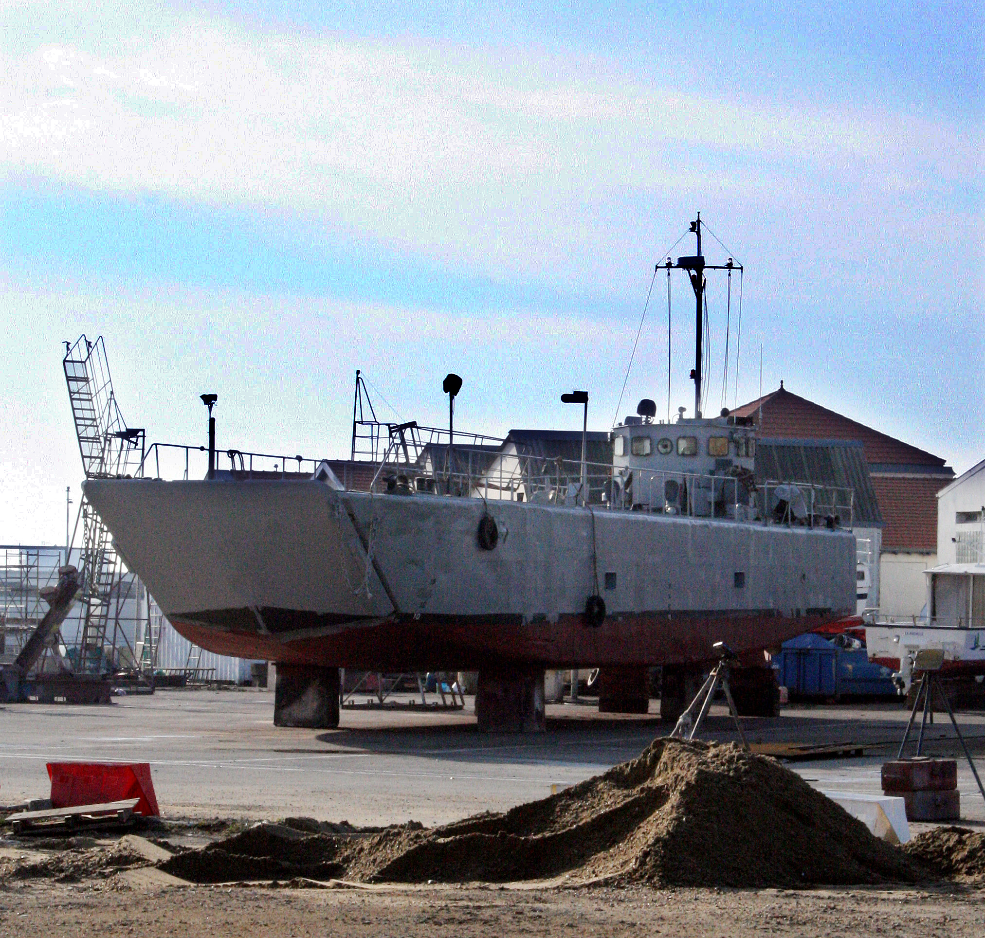 Bateau armée de terre a quai à la Rochelle. Chaland de transport de matériel (CTM) du 519e régiment du train